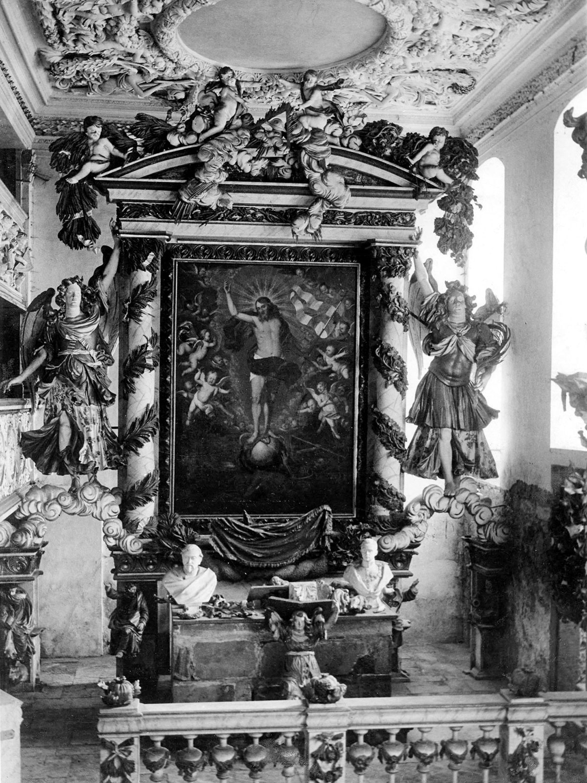 Friedrichswerth, Schloss Friedrichwerth, Altar der Schlosskirche um 1900